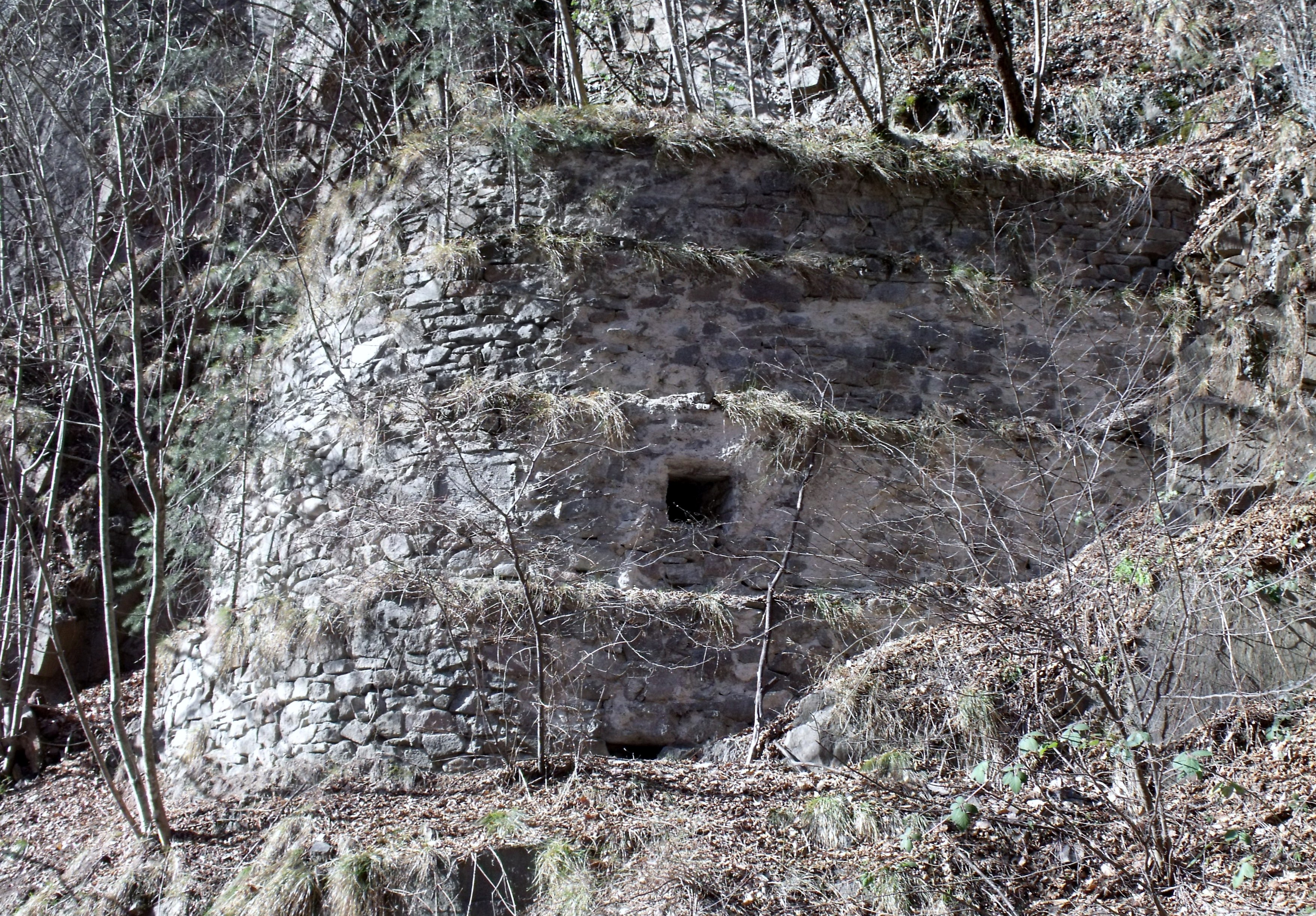 Opera 5 val d'Ega